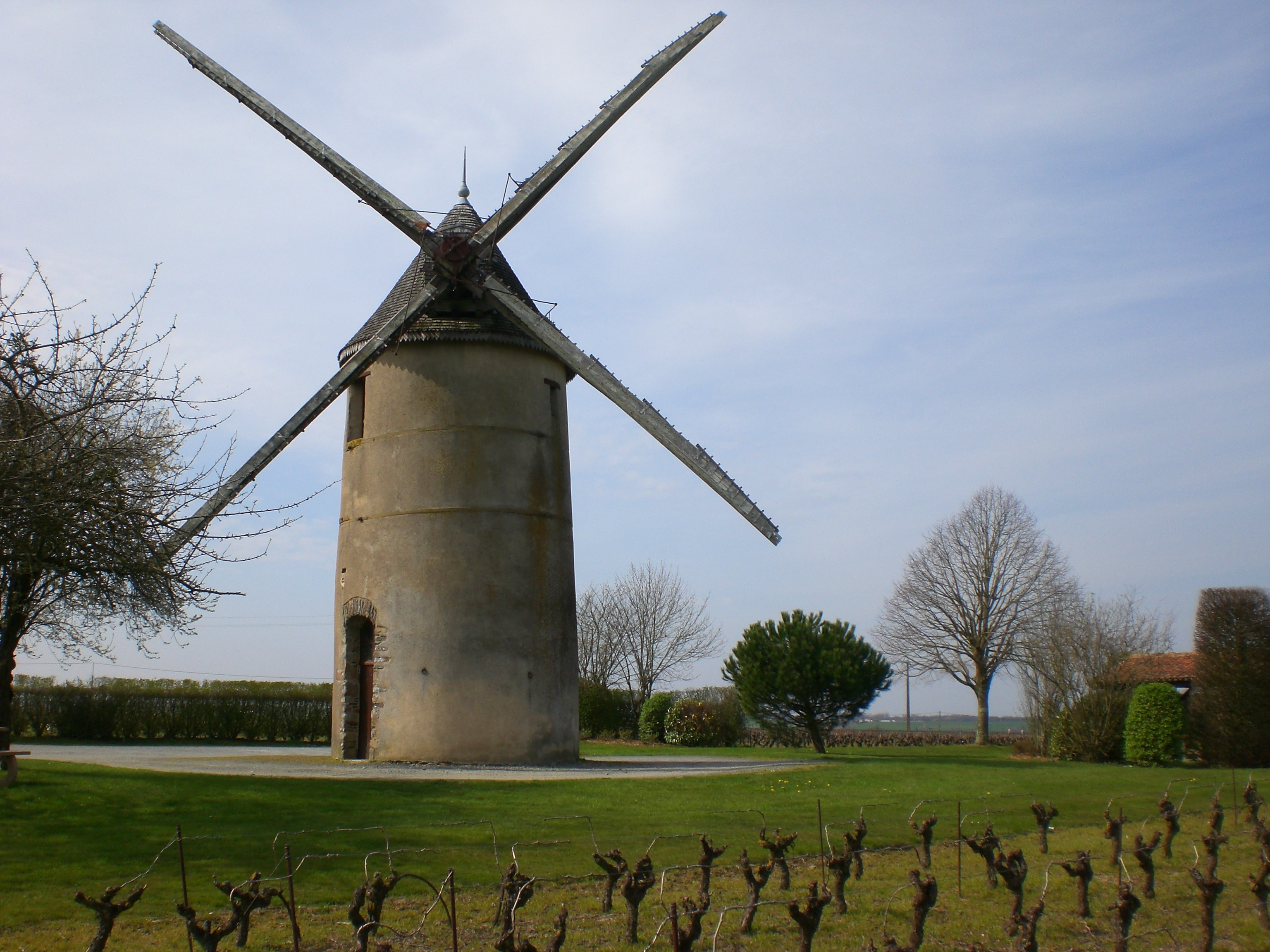 Moulin Guillou, Fr-49-Tillières.